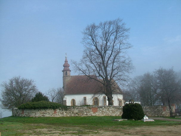 Nógrádsáp - gótikus templom